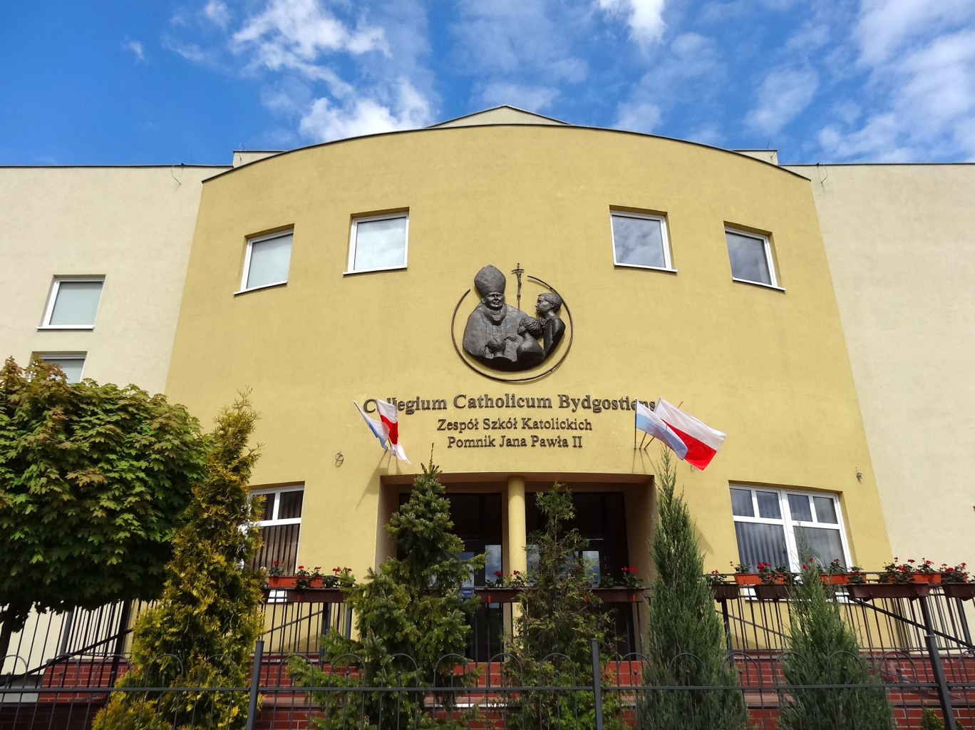 Collegium Catholicum Bydgostiense, szkoła katolicka - pomnik Jana Pawła II w Bydgoszczy